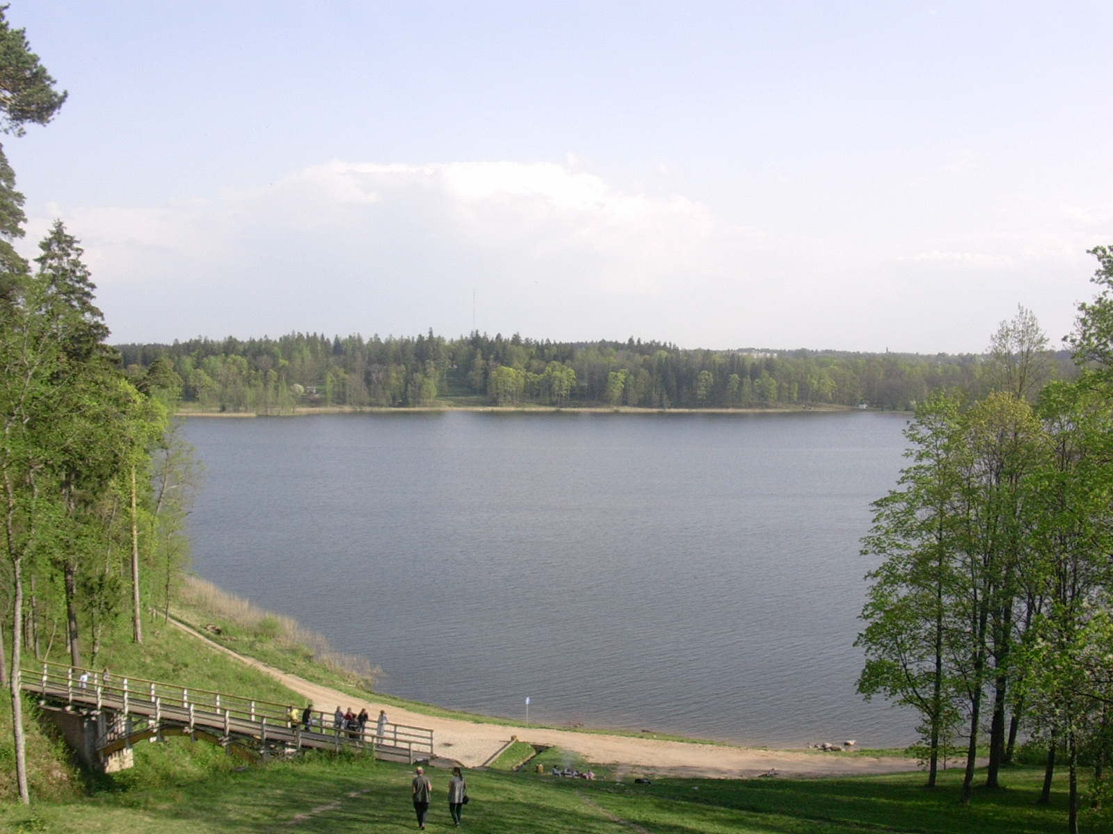 Alūksnes ezers. (Ievas Upenieces foto)